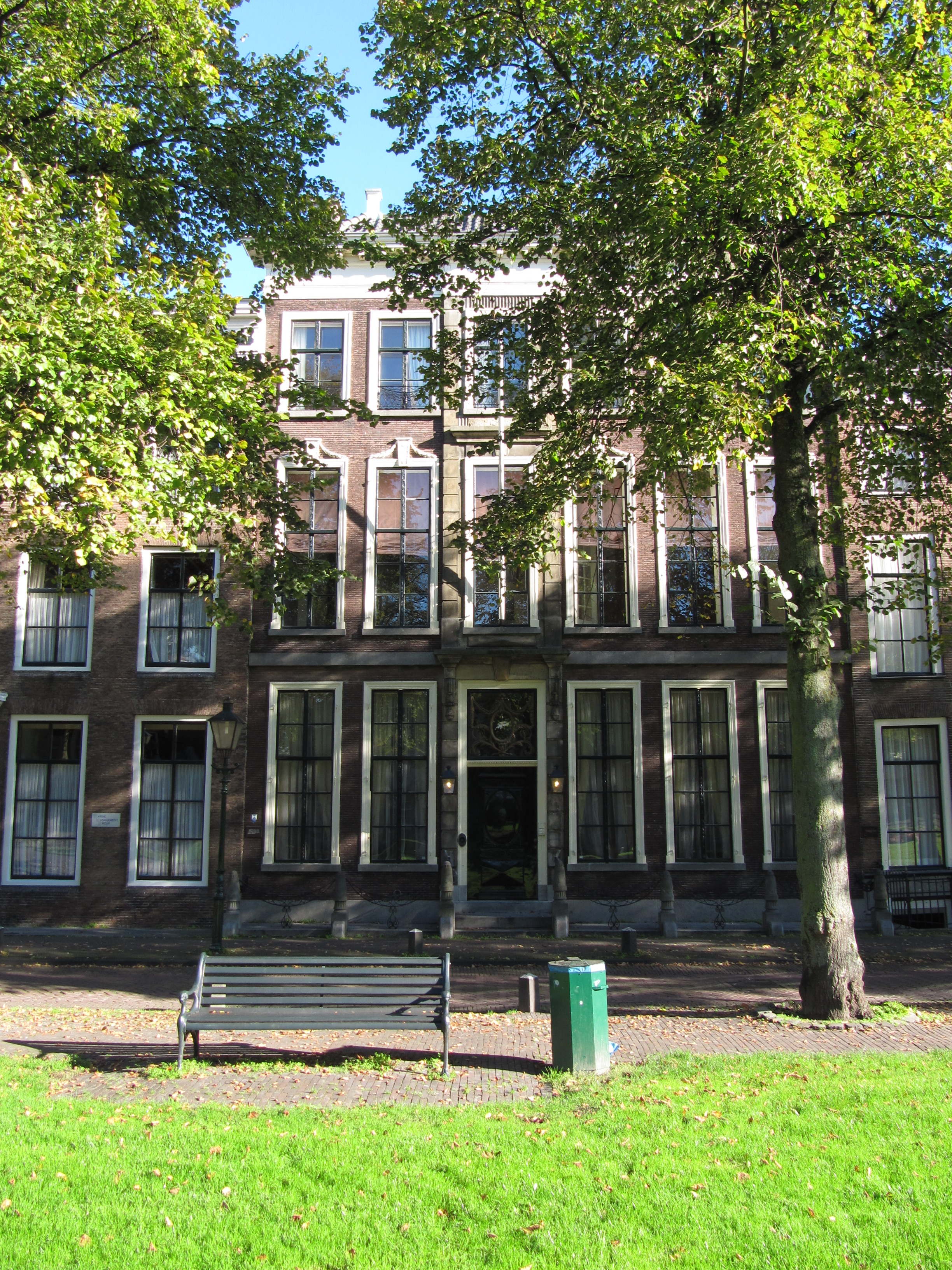 RM40568 Zierikzee - Havenpark 33.jpg